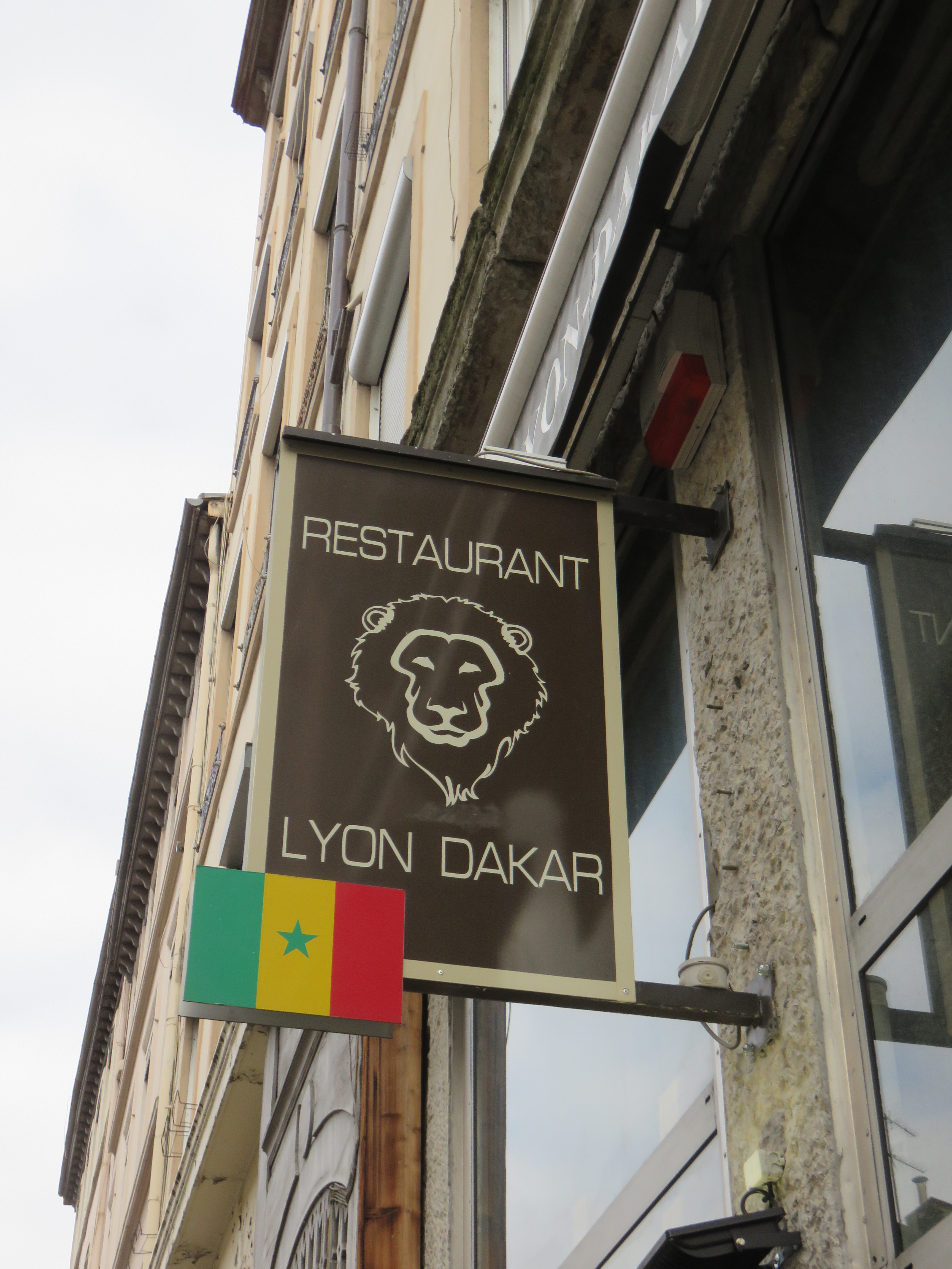 Enseigne du restaurant sénégalais Lyon Dakar, rue de Créqui, dans le 3e arrondissement de Lyon.